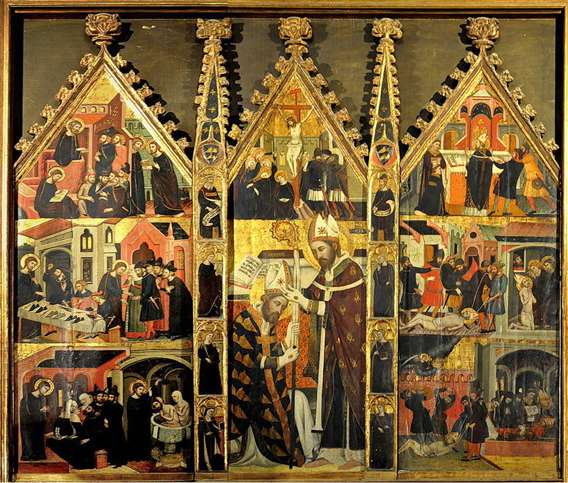 Retaule de sant Marc i sant Anià d'Alexandria, obra d'Arnau Bassa de 1346. Encarregat pel gremi de Sabaters per a la Catedral de Barcelona, va ser traslladada a Manresa el 1443